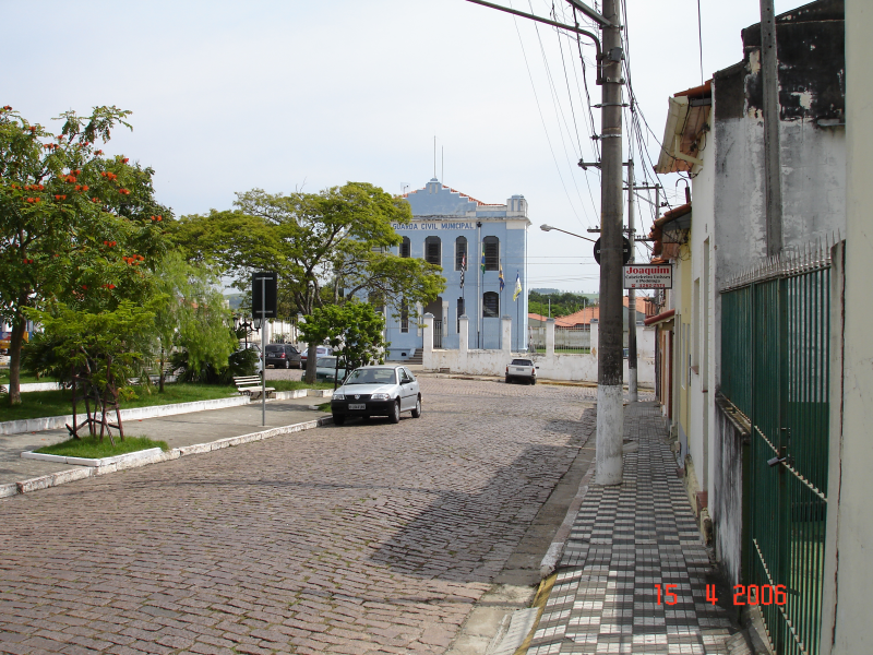 Predio da guarda civil municipal